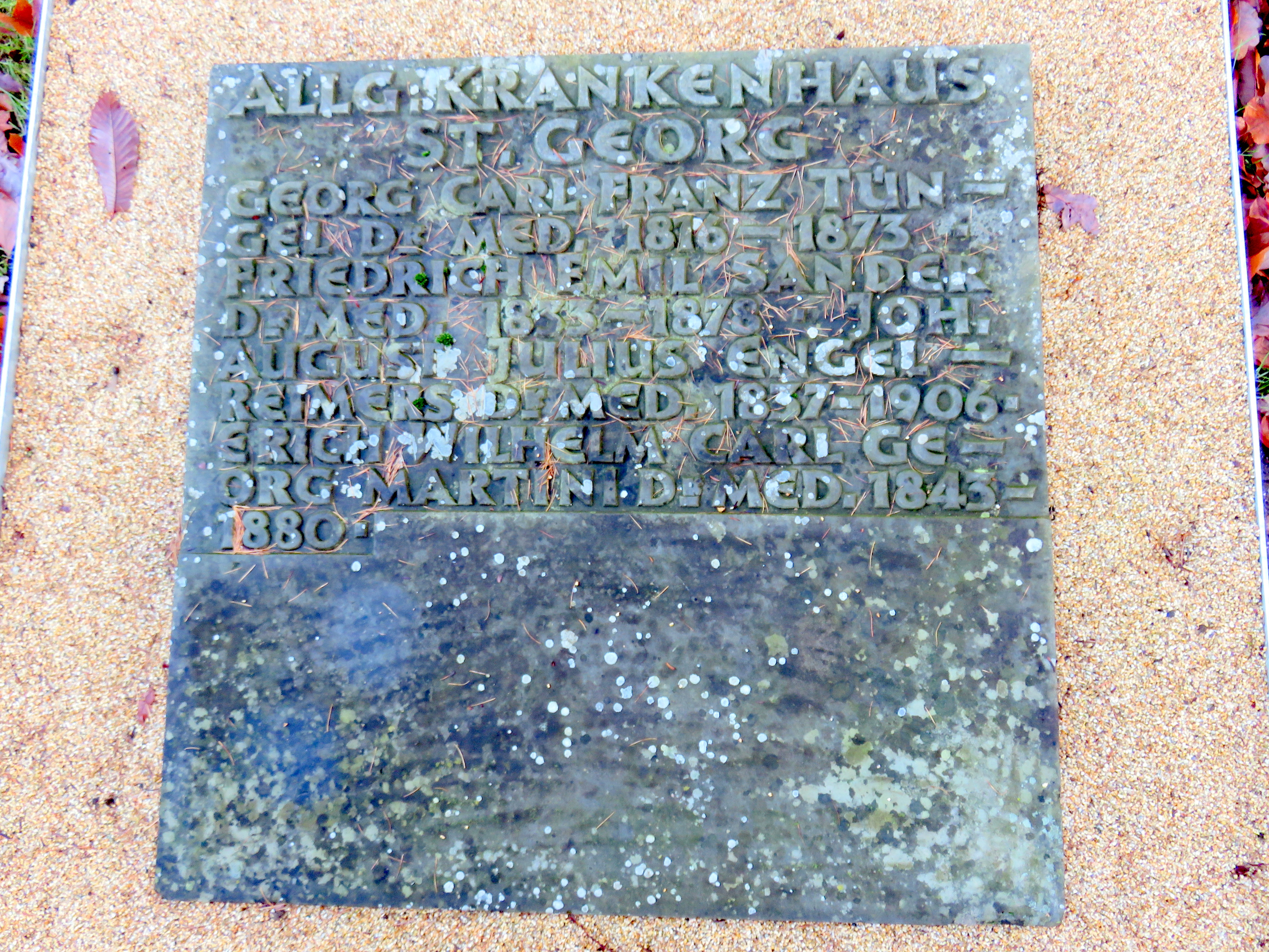 Sammelgrabmal Allg. Krankenhaus St. Georg im Bereich des Althamburgischen Gedächtnisfriedhofs auf dem Hamburger Friedhof Ohlsdorf zu Ehren von unter anderen Georg Karl Franz Tuengel, Erich Martini.